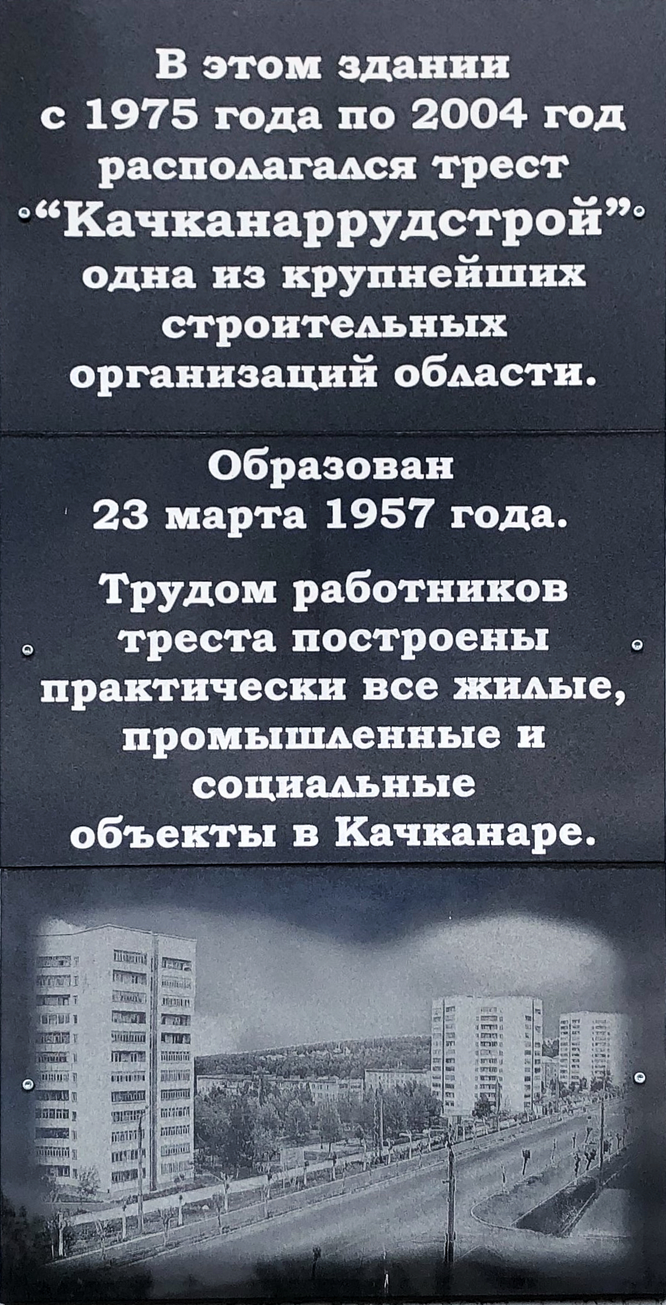 Памятная табличка на бывшем здании треста «Качканаррудстрой»